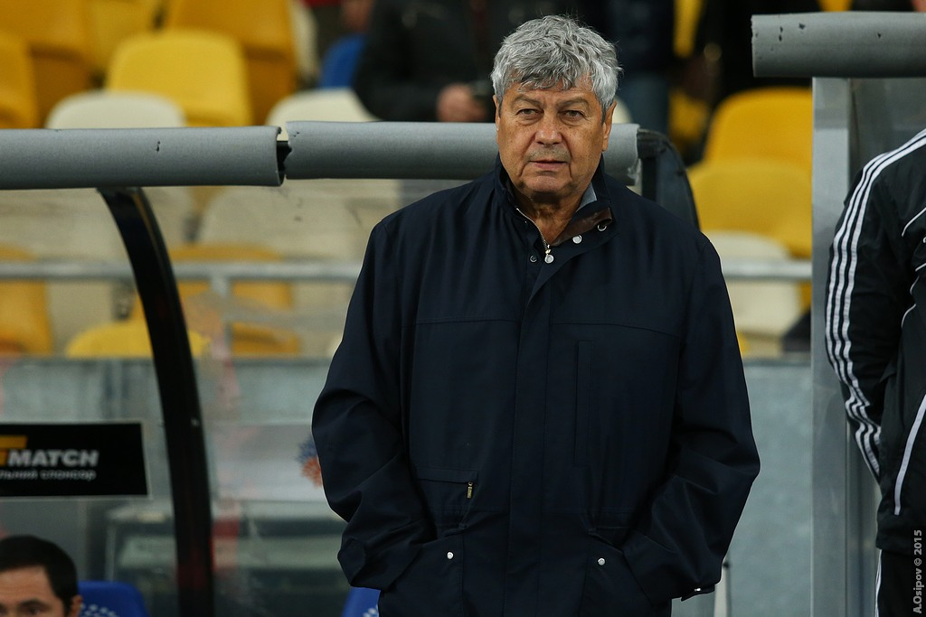 16.10.2015 г.Киев. НСК "Олимпийский". 11-й тур Лиги Пари-Матч. Динамо Киев - Шахтер Донецк - 0:3